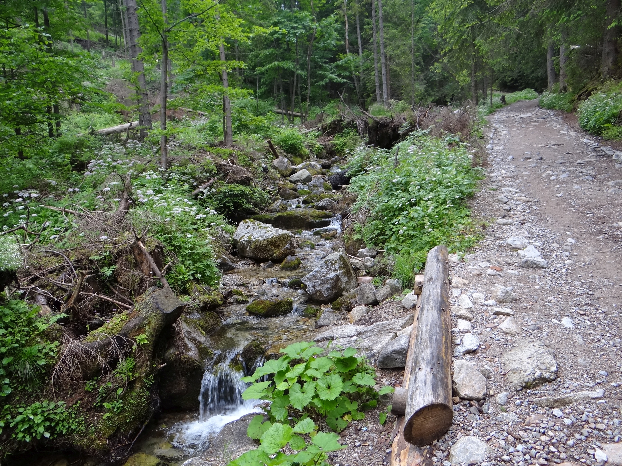 Potok Jaworzynka w dolnym biegu, w pobliżu wlotu do Bystrej